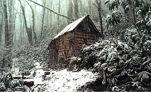 Первая келья инока (бывшего) Олега Урюпина в горах Кавказа